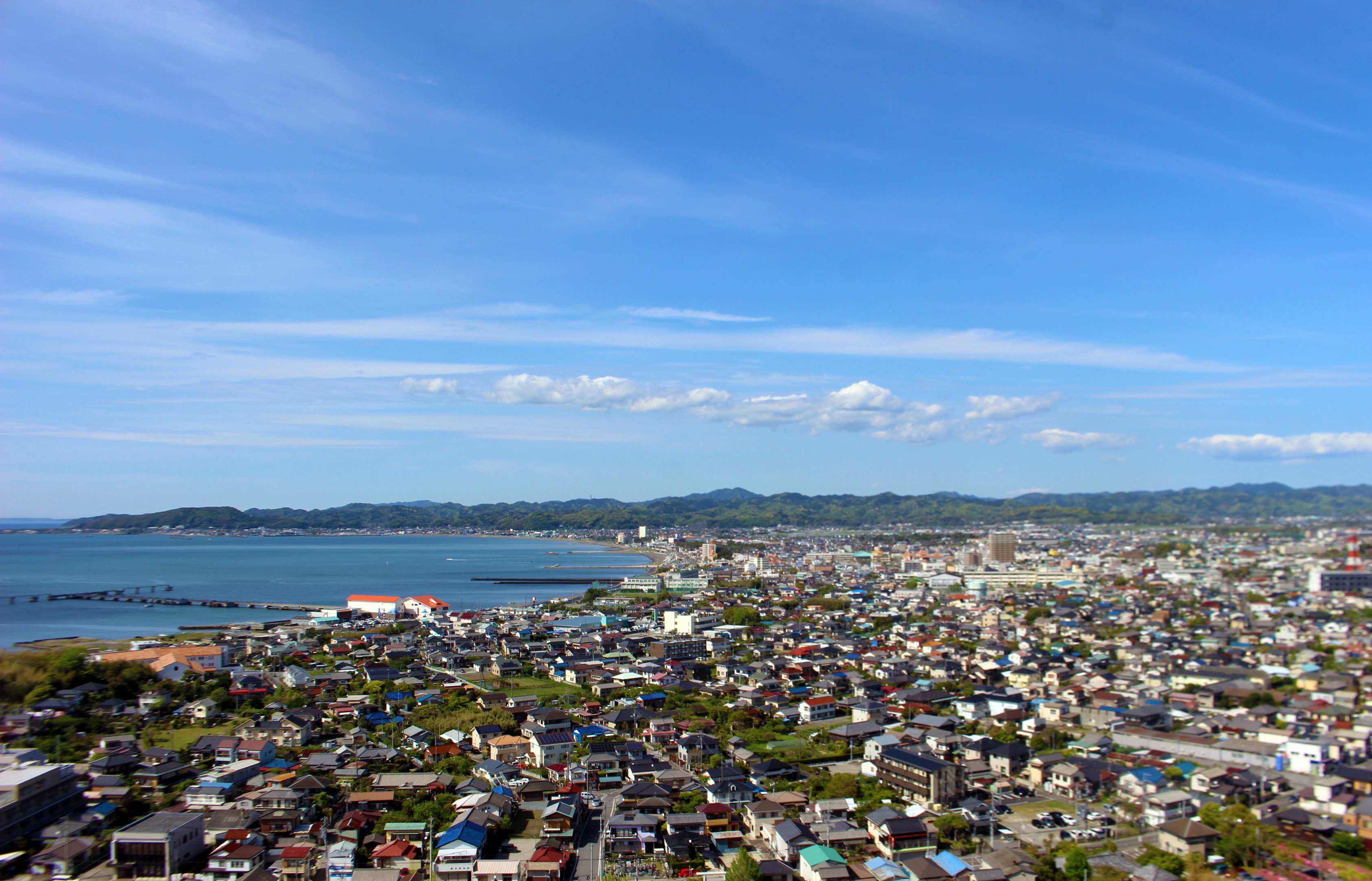 館山城から館山市街地をのぞむ